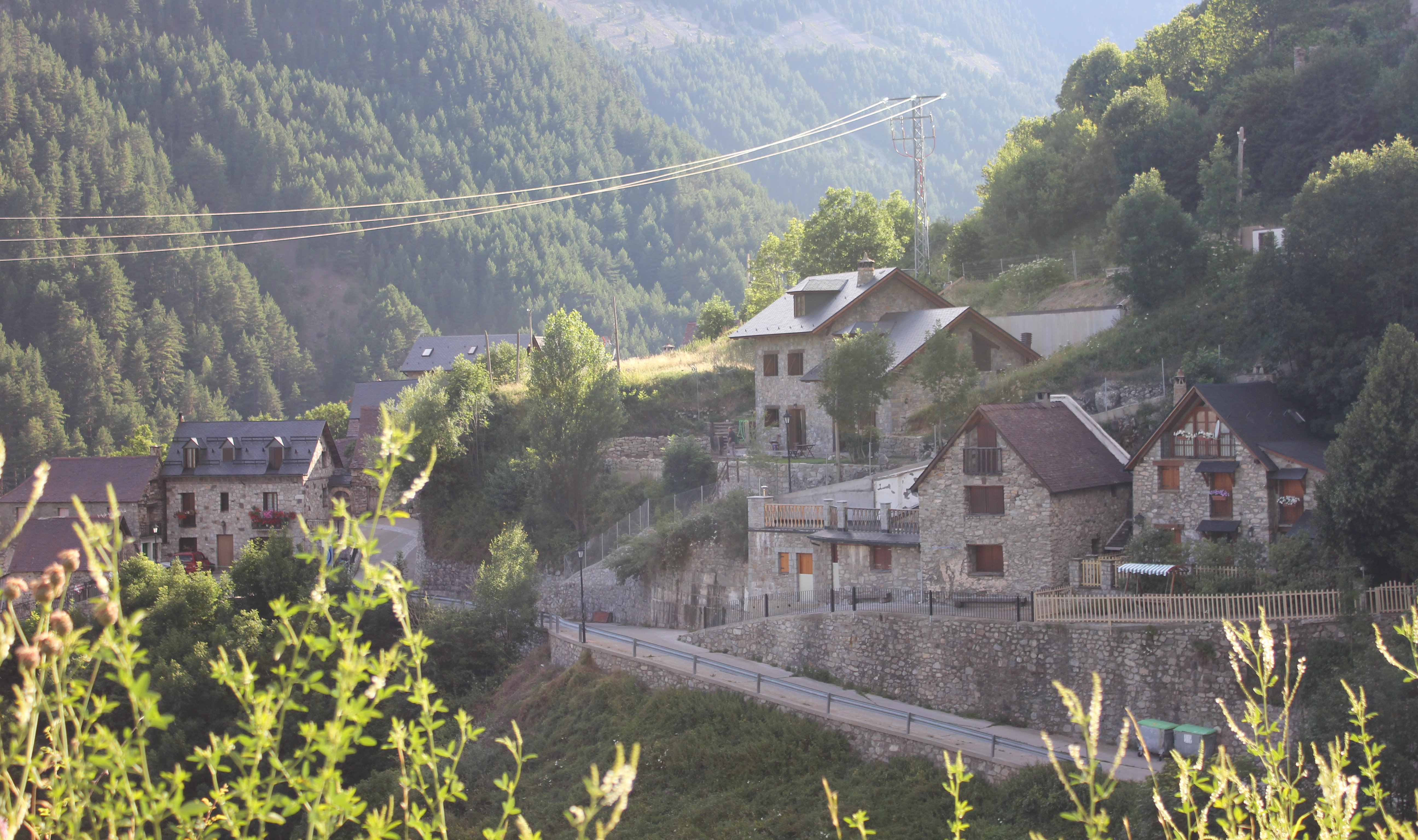 Aragonés: Chisagüés